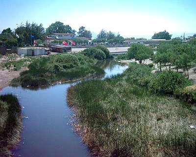 Las riberas del río Loa desde el puente colgante del parque homónimo